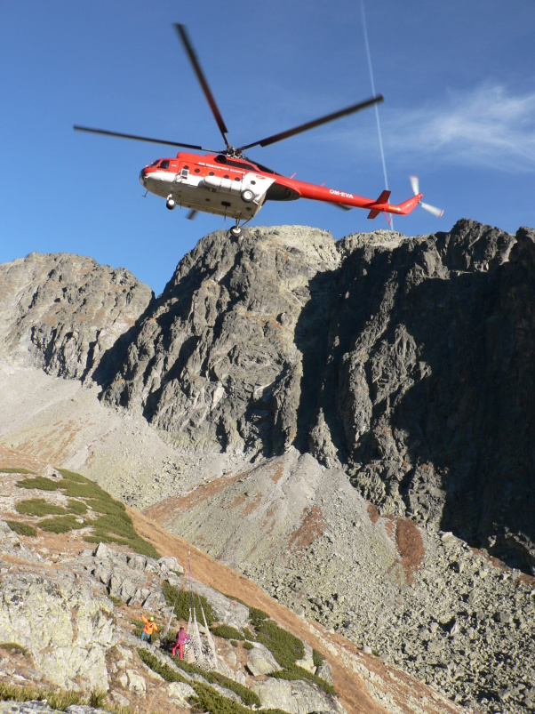 Mil Mi-8 vo Veľkej Studenej doline vo Vysokých Tatrách odstraňuje trosky vrtuľníka Mil Mi-4, ktorý tu havaroval v roku 1969